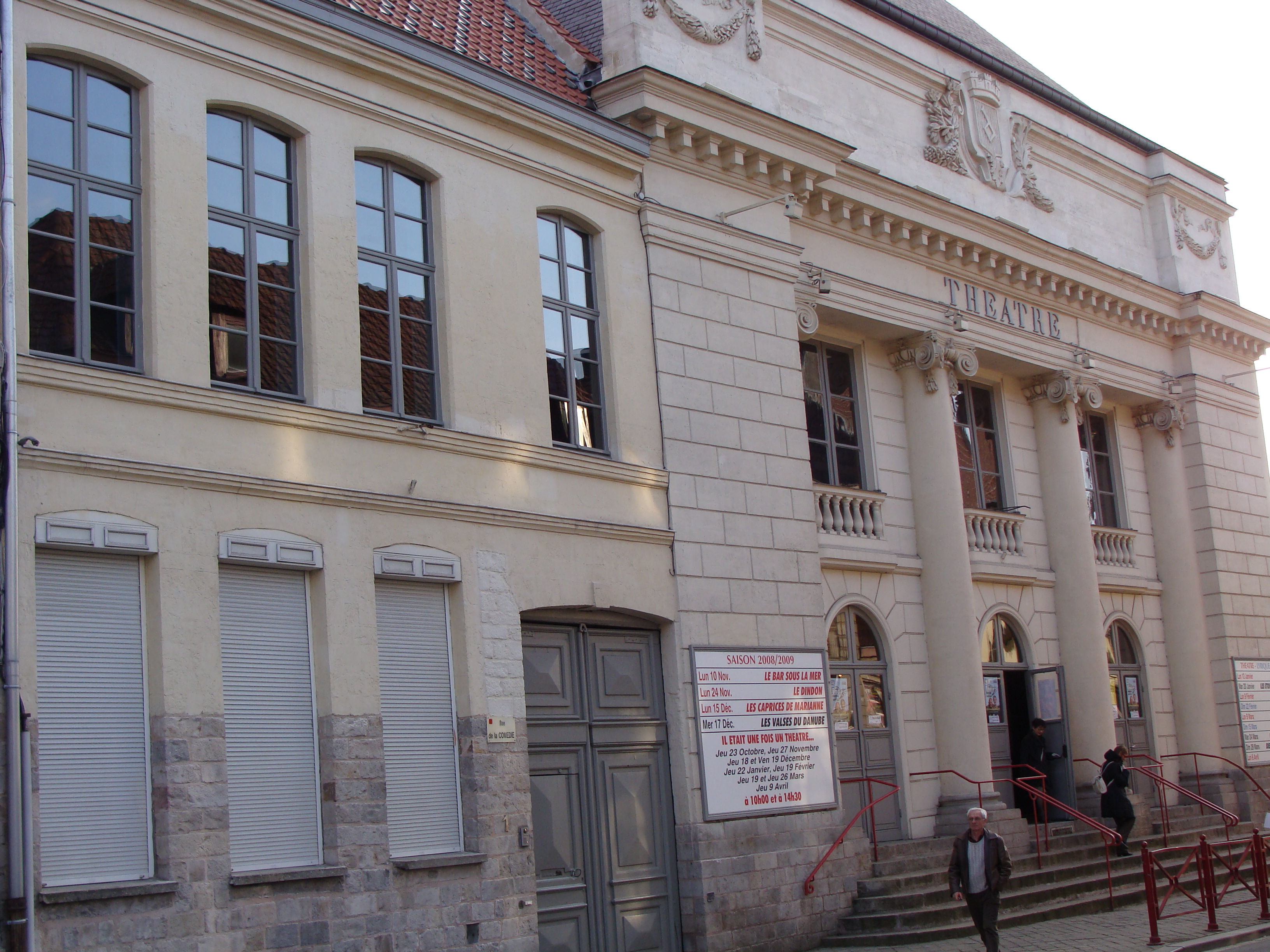 Théâtre de douai Façade rue de la comédie